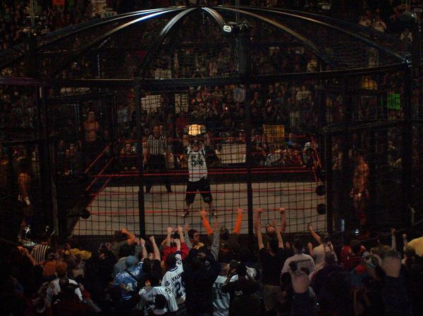 John Cena en tant que champion de la WWE à New Year's Revolution 2006.